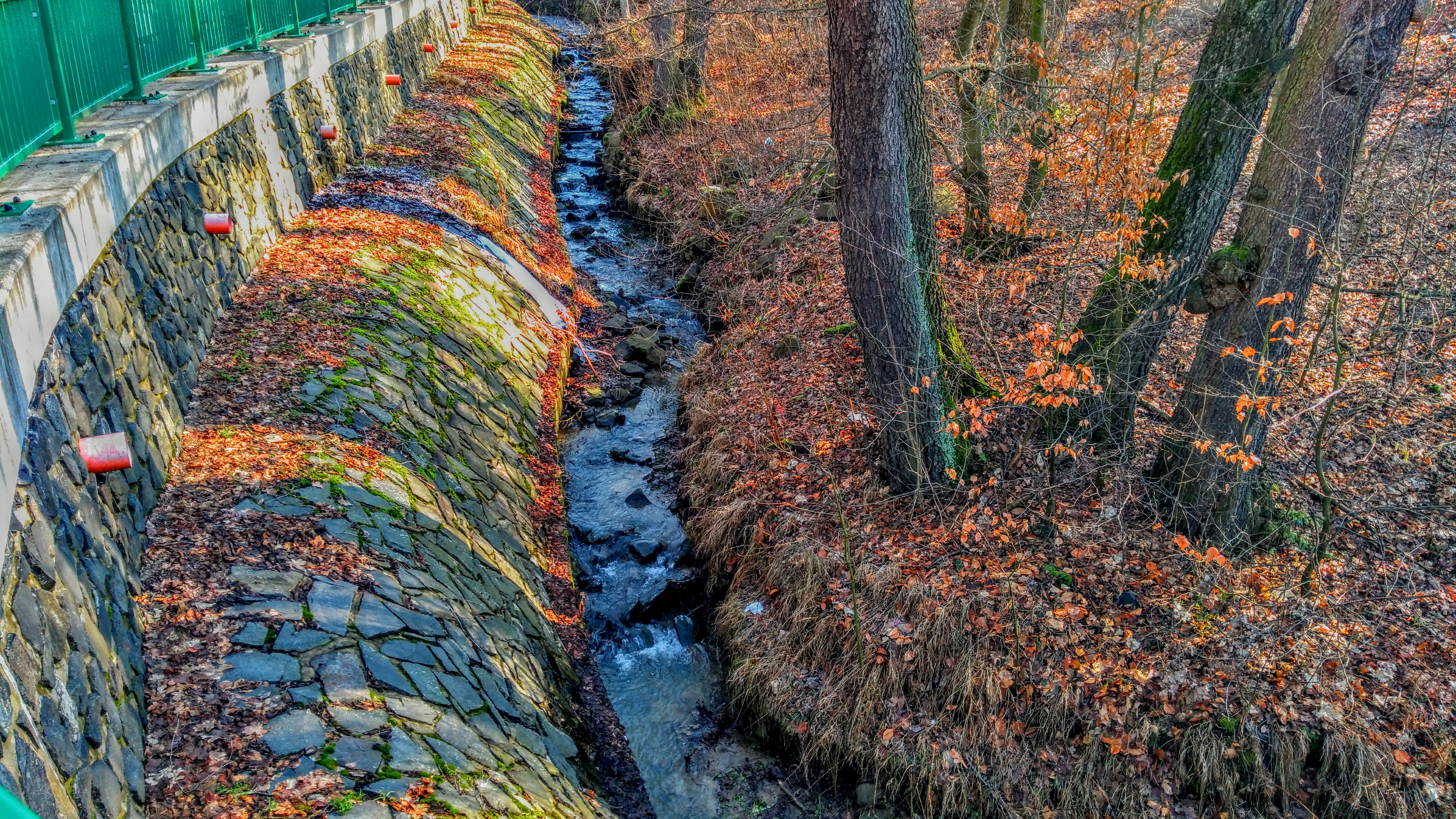 Potok.